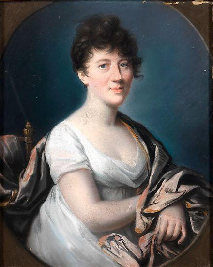 Portrait der Gräfin Charlotte von Hardenberg